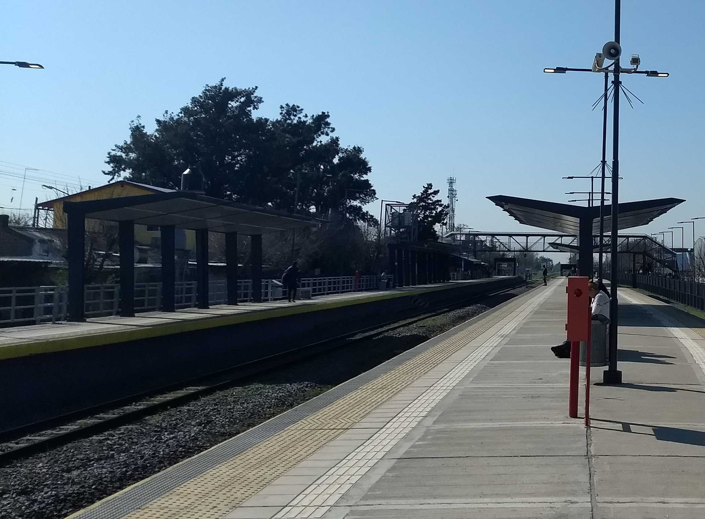 Estación Rafael Castillo de la línea Belgrano Sur.